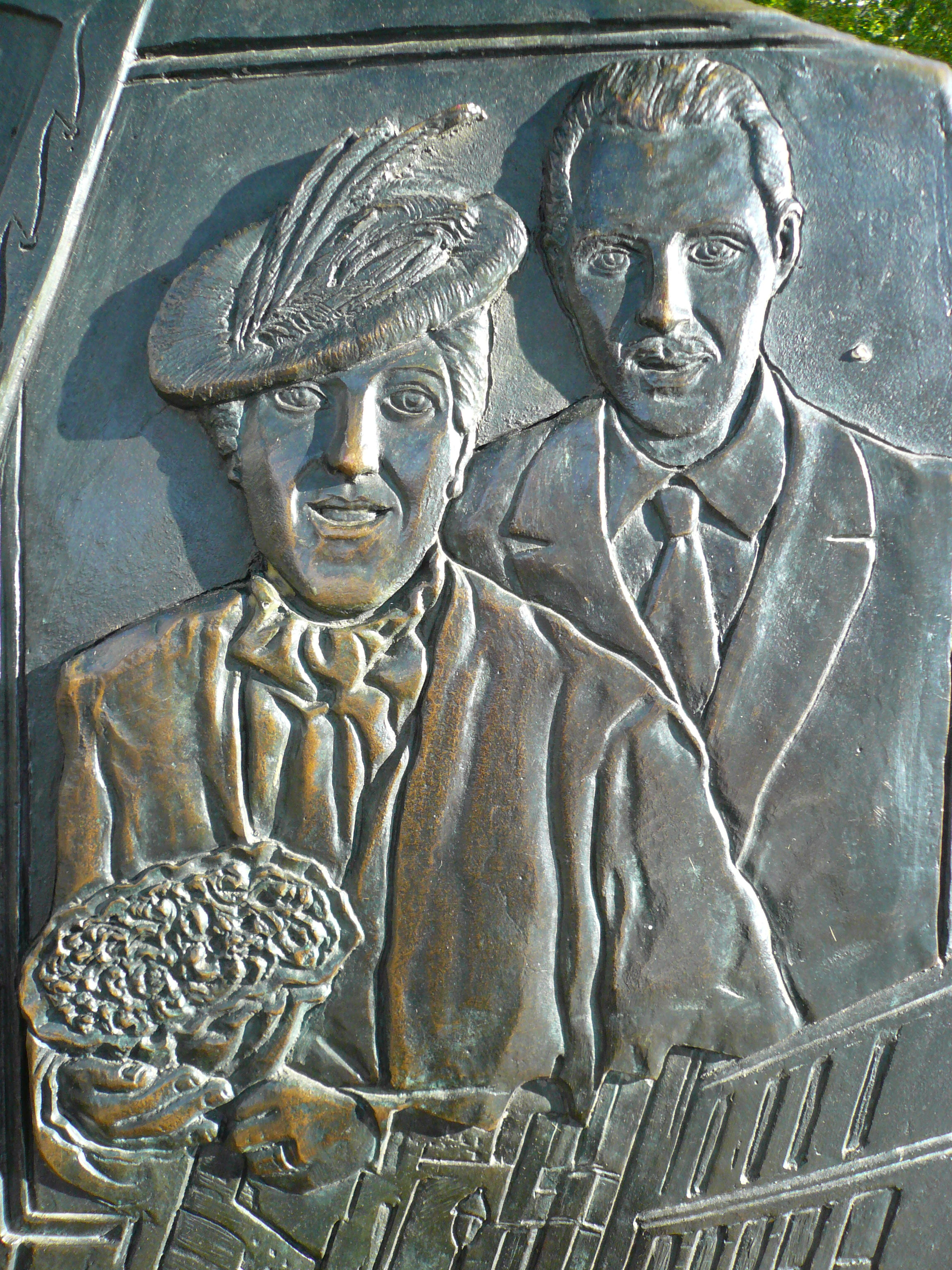 Als Santpere. La Rambla (Santa Mònica) (Barcelona). Escultor: Juan BordesArquitectes: Oscar Tusquets, Carlos Díaz, col·laborador Eduardo Egozcue, signada. Material: pedra artificial vermellosa amb relleus de bronze i instal·lació de fibra òptica. 1995. 06″ N, 2° 10′ 35.15″ E